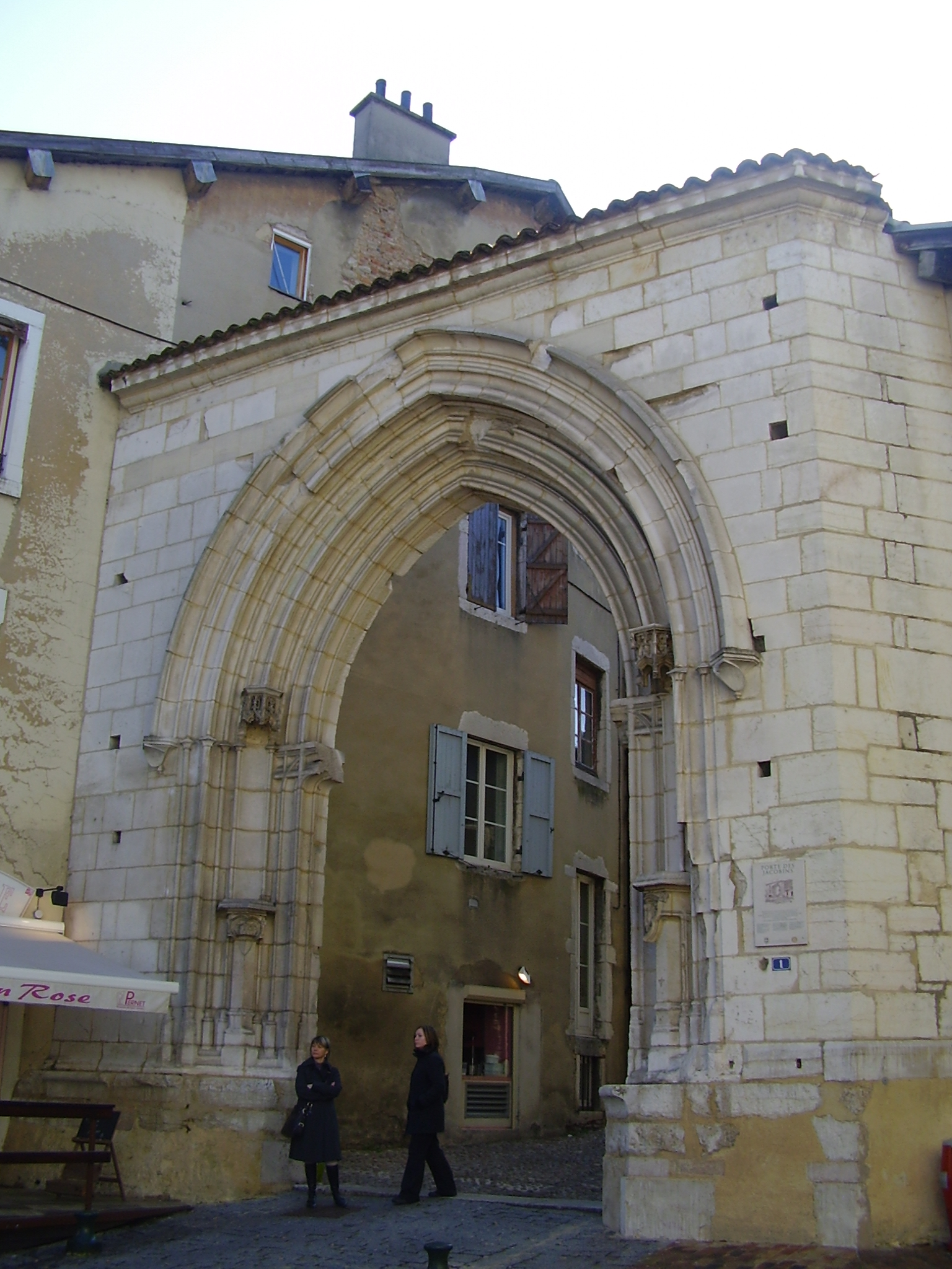 Porte des Jacobins, vestige de l'ancien couvent